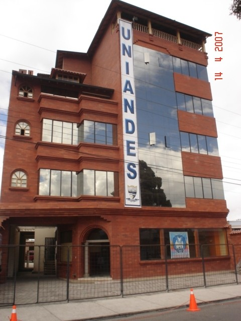 Uniandes Riobamba